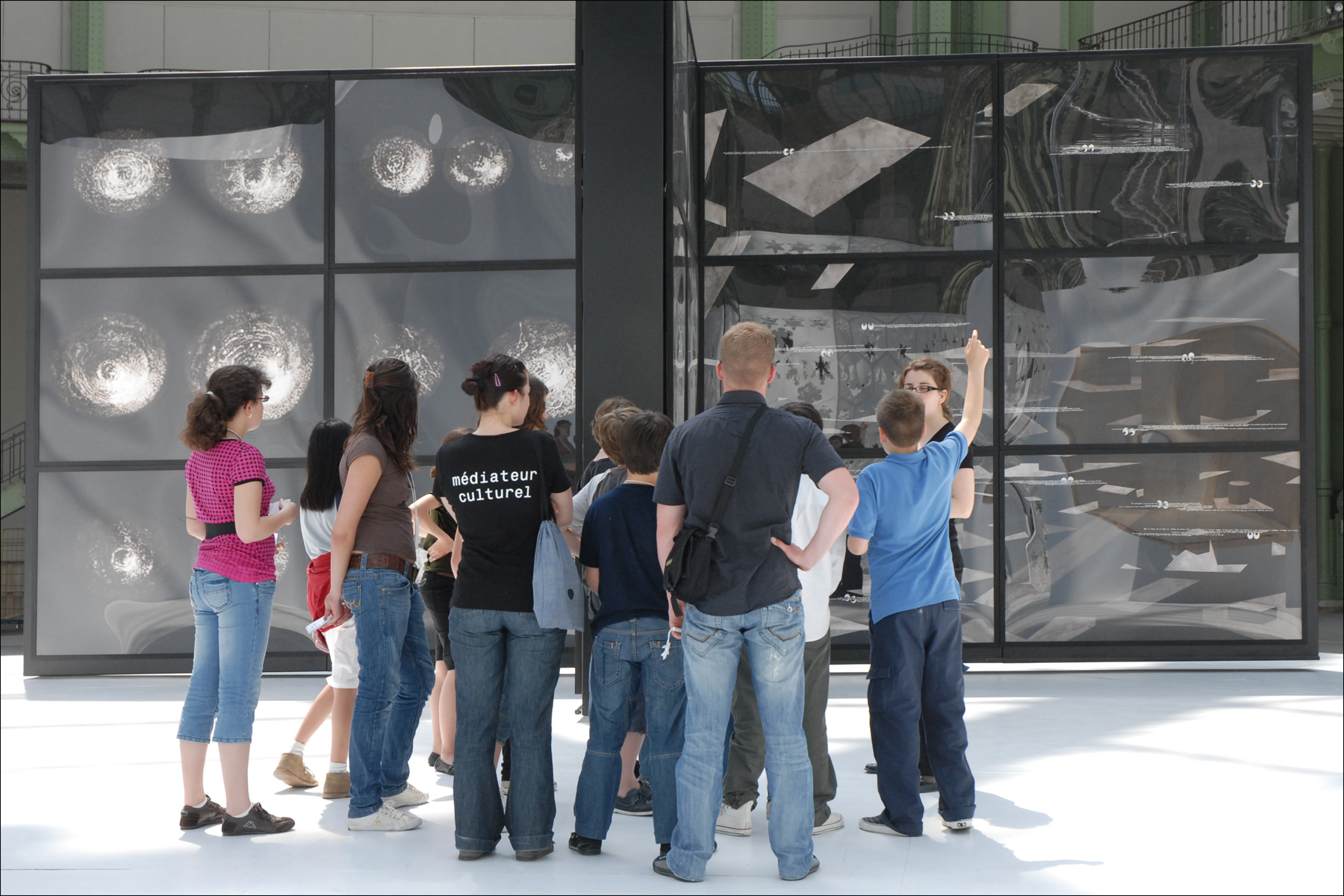 Un groupe de visiteurs de l'exposition accompagné par des médiateurs culturels intervenant dans le cadre de la manifestation. Manifestation triennale, organisée à l’initiative du Ministère de la Culture et de la Communication, LA FORCE DE L’ART a pour ambition d’offrir une scène à la création contemporaine en France et aux artistes qui l’animent, dans la diversité de leurs origines et de leurs choix esthétiques. Deuxième édition de cette manifestation, LA FORCE DE L’ART 02 se déploie à partir de la nef du Grand Palais à Paris, du 24 avril au 1er juin 2009.